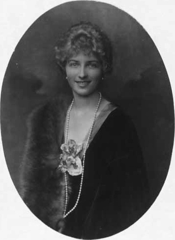 Prinzessin Franziska von Hohenlohe-Schillingsfürst